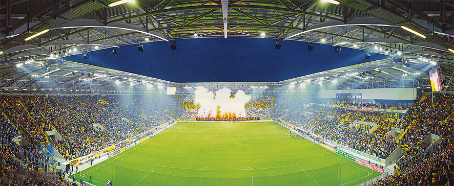 Die Stadioneröffnung am 15. September 2009 in Dresden.